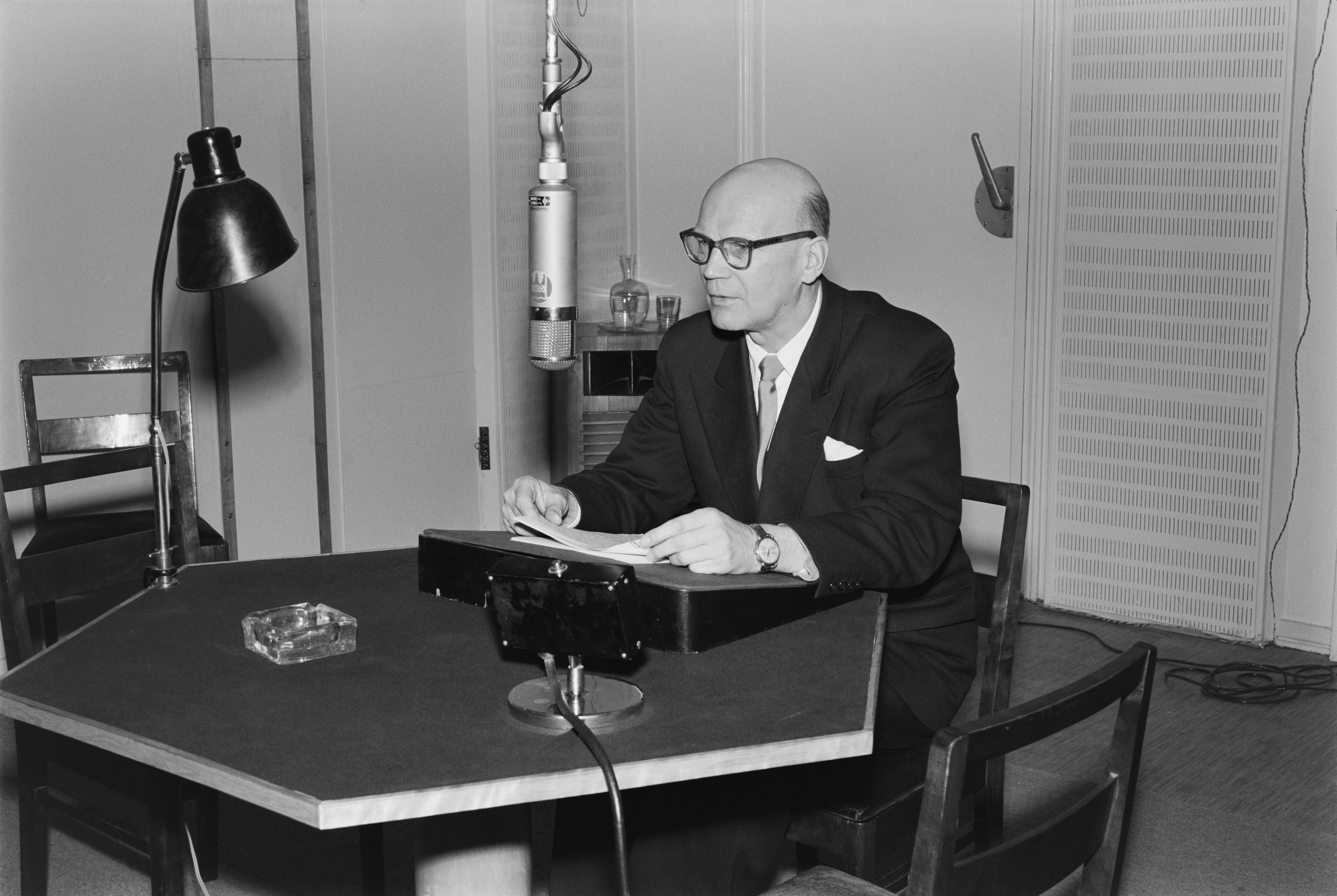 Suomen presidentinvaalit 1956, presidenttiehdokkaiden radiopuheenvuorot 11.-12.1.1956. Presidenttiehdokas Urho Kekkonen radion studiossa. Tiedätkö jotain tästä kuvasta? Jätä kommentti tai ota yhteyttä sähköpostitse: Tutustu Ylen arkistosisältöihin: Fler skatter från Yles arkiv: More about Yle, the Finnish Broadcasting Company